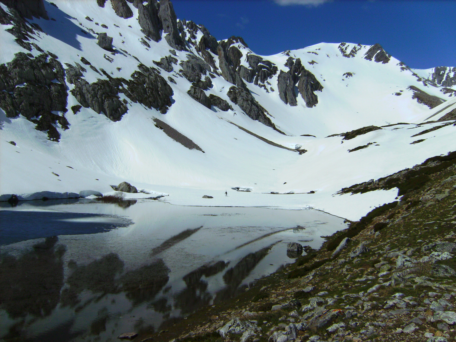 En abril